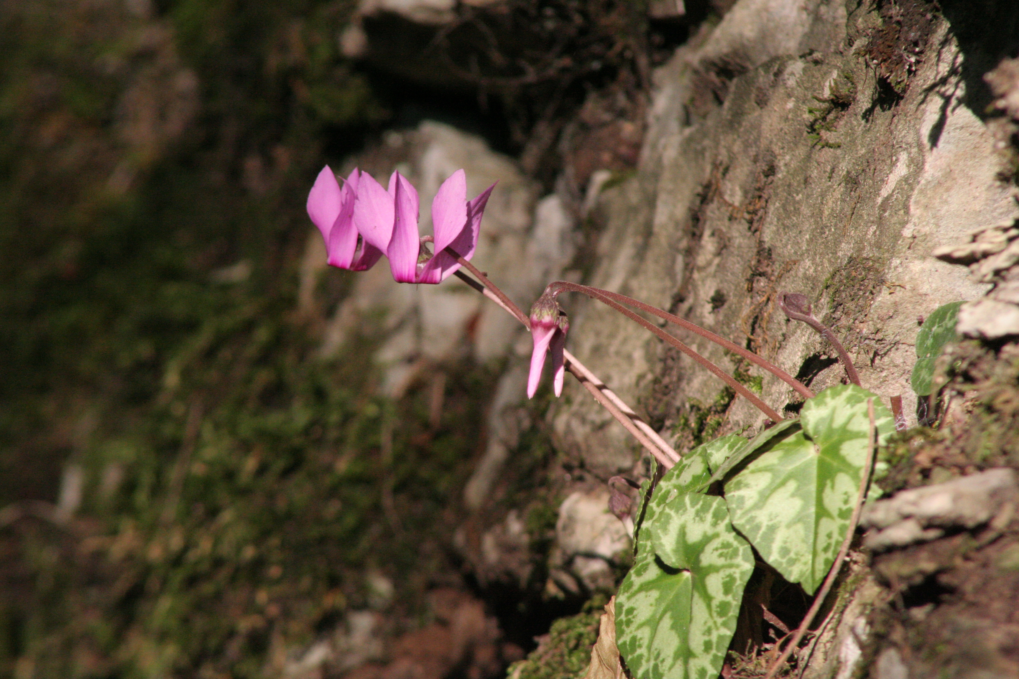 Cyclamen_purpurascens (Ciclamino delle Alpi) Località Carmegn (BL) 465 m s.l.m. 31/8/2007